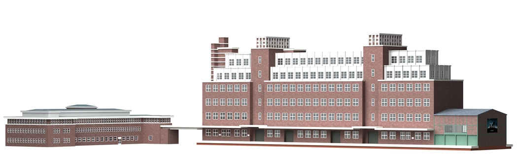 Rheinisches Industriemuseum